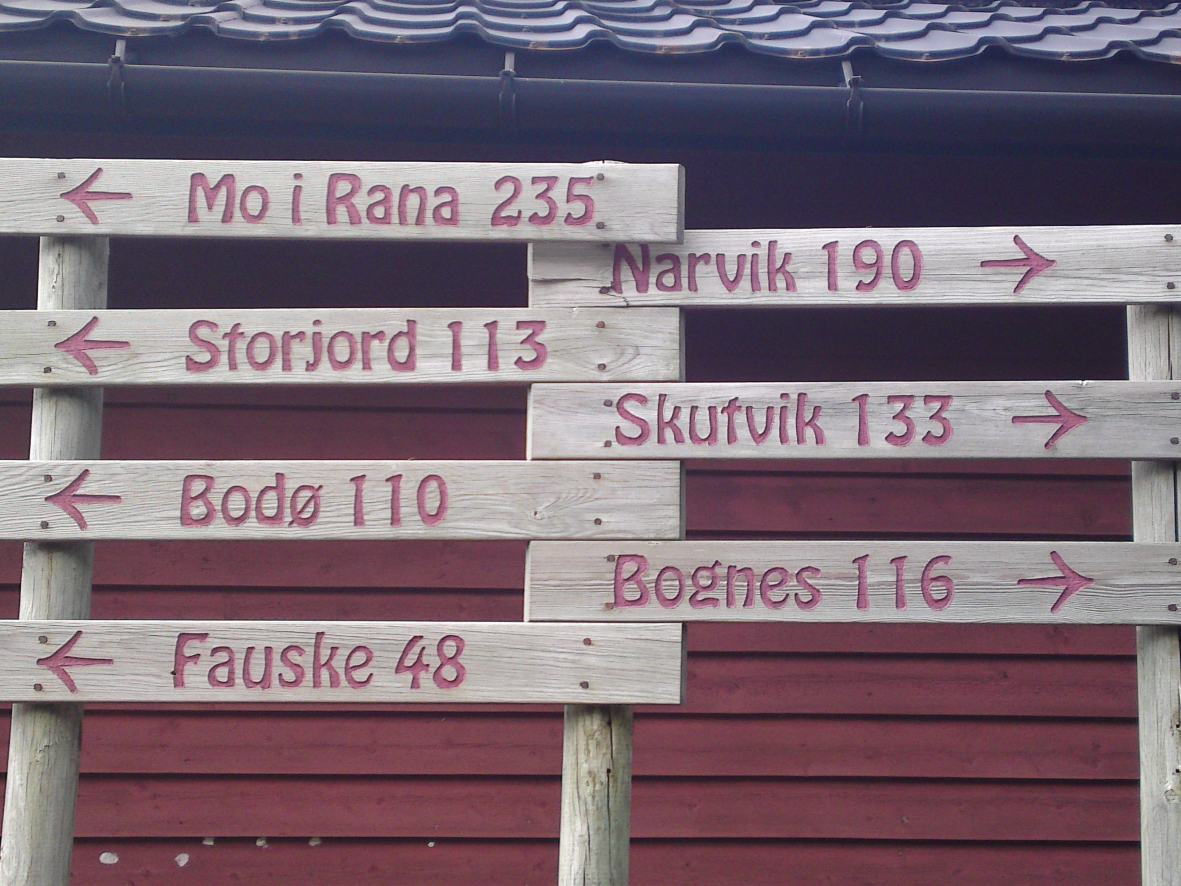 Skilt med avstander fra en resteplass i Sørfold kommune.